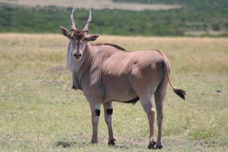 Éland mâle, dans la Réserve nationale du Masai Mara au Kenya.